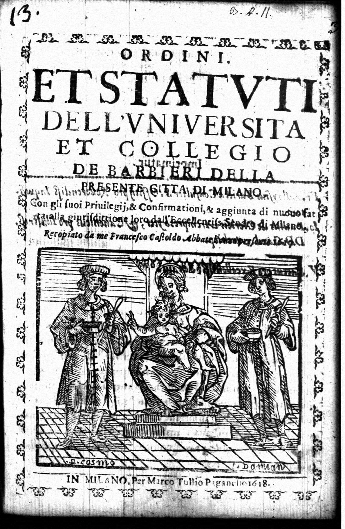 Frontespizio